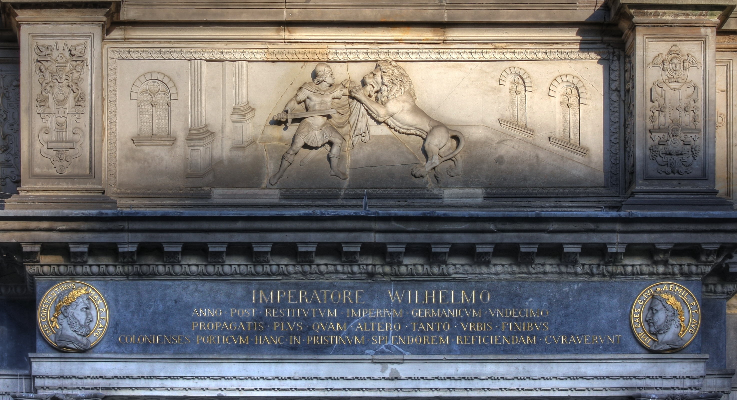 Löwenkampf des Hermann Gryn. Mittleres Relief am Fries der Rathauslaube des Kölner Rathauses.